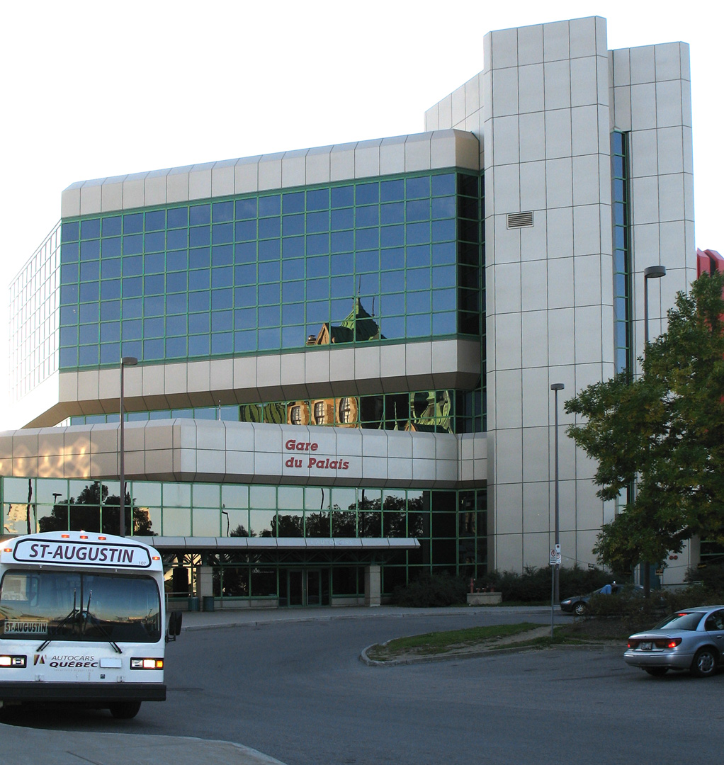 Gare routière de Québec au Vieux-Port